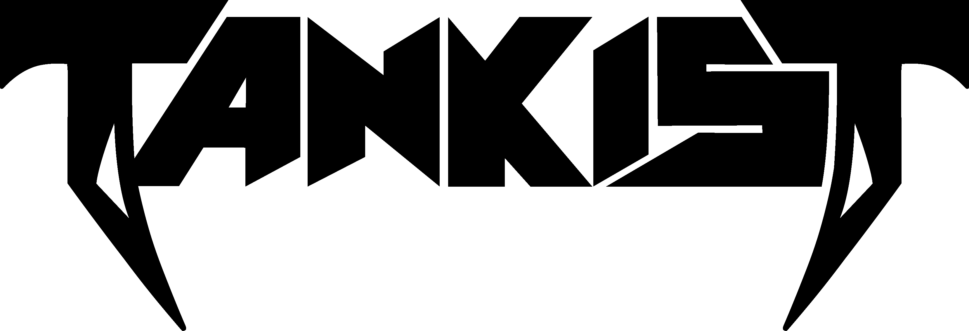 Tankisti logo on väheste muudatustega olnud kasutusel bändi loomisest saati ning ilmunud ansambli kõigi muusikateoste kaanepiltidel. Kujundanud Fengarm.